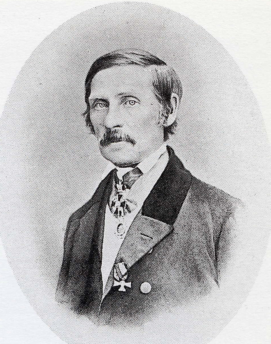 Eläintieteen professori Alexander von Nordmann (1803–1866)